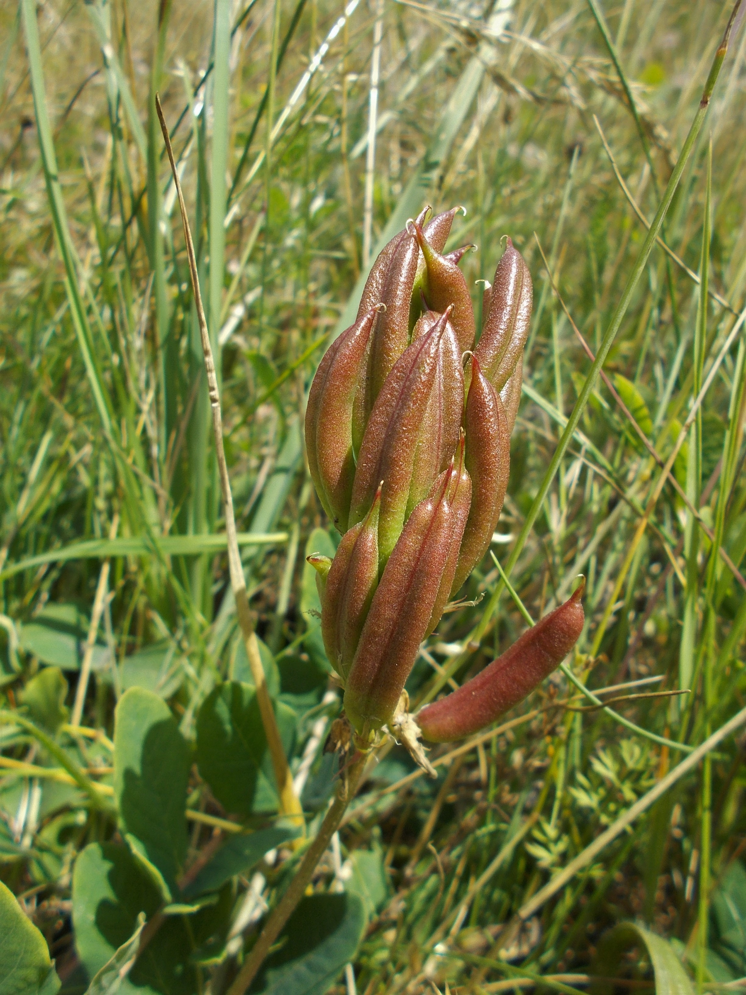 Peulen van de hokjespeul die groeit in een berm bij tussen provinciale weg N348 en het Overijsselsch Kanaal bij de Croddenbrug in Deventer